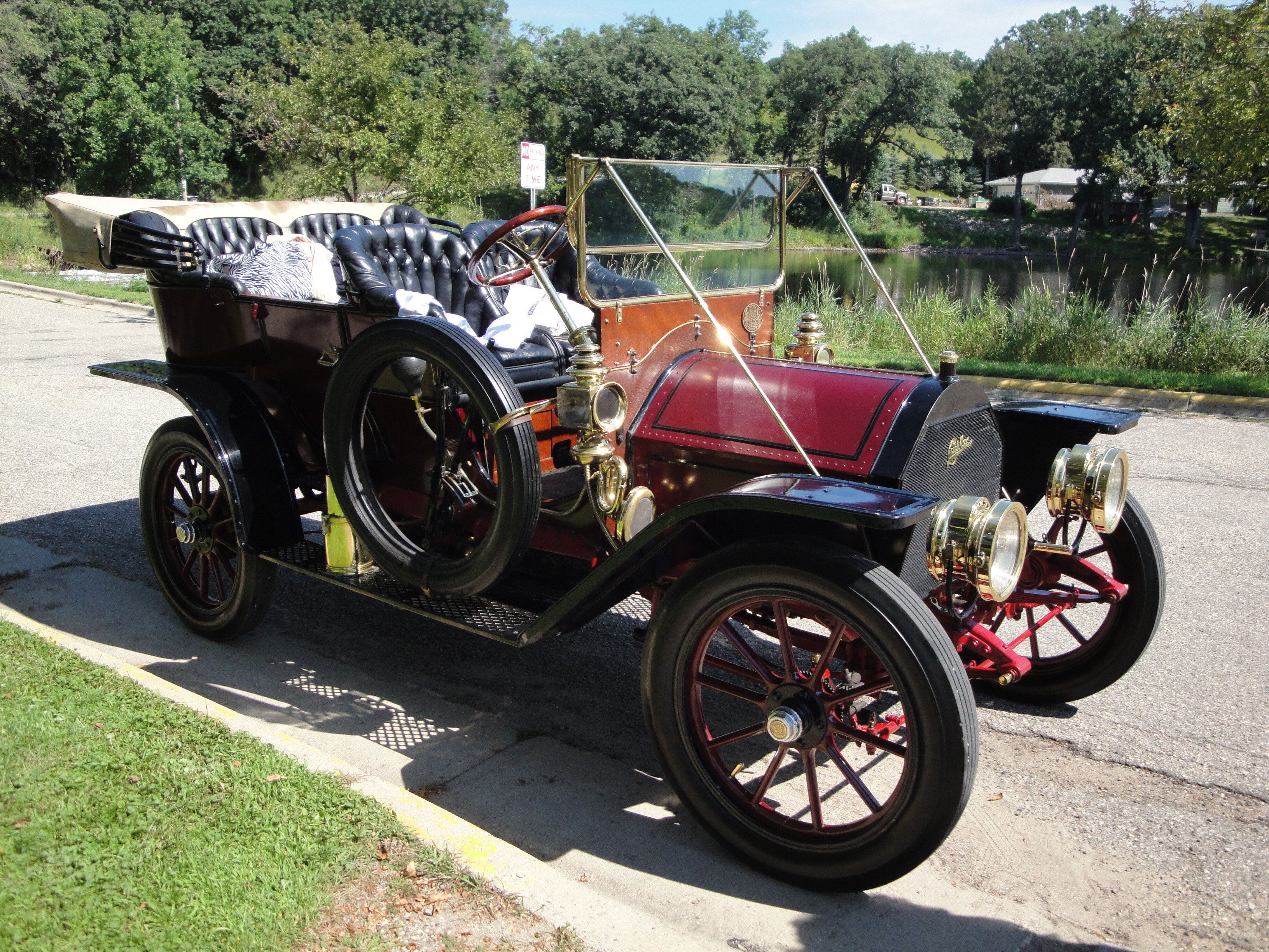 1908 Cadillac Model 30 Touring